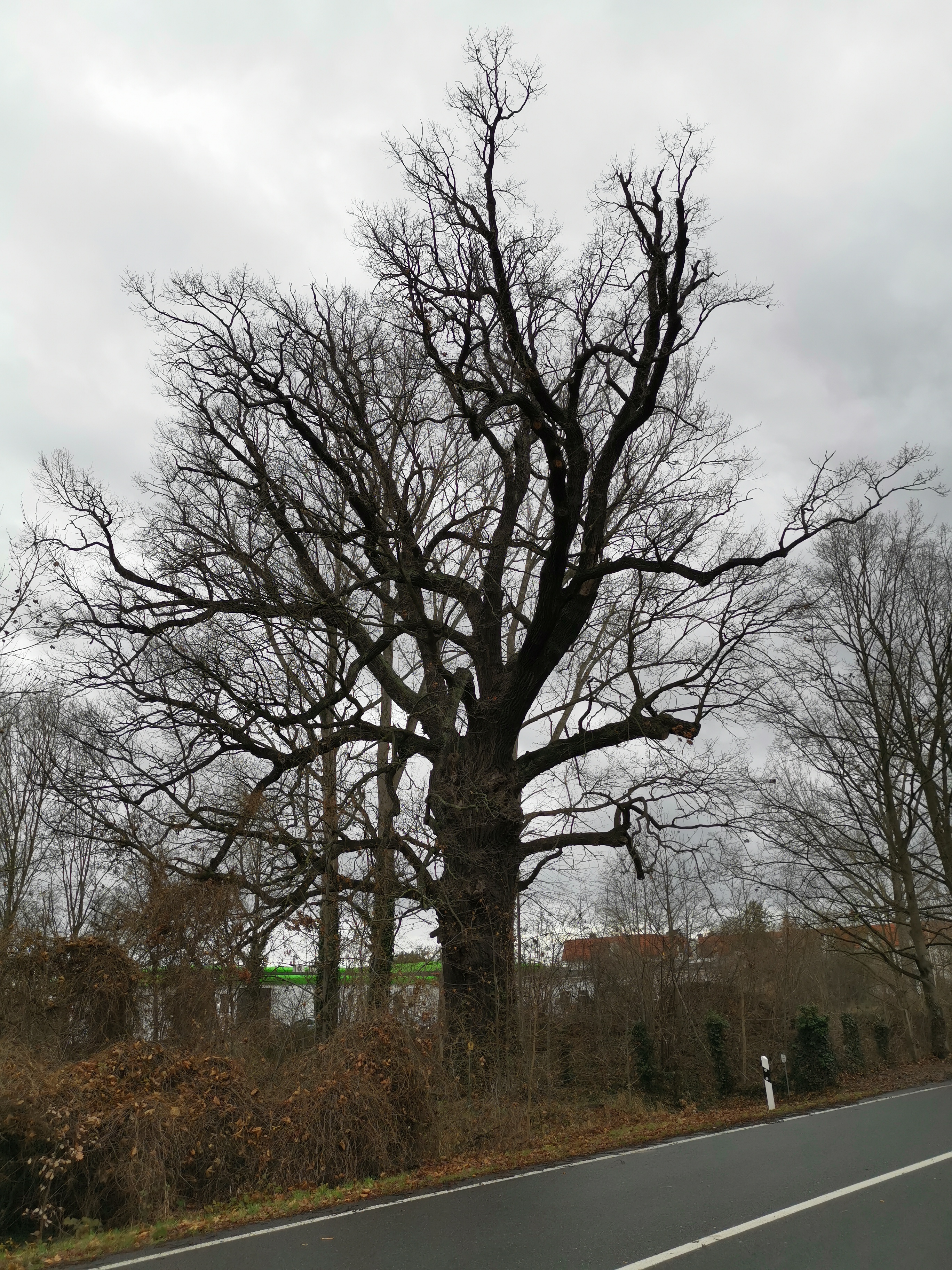 Als Naturdenkmal geschützte Stieleiche in Groß Beuchow an der A13